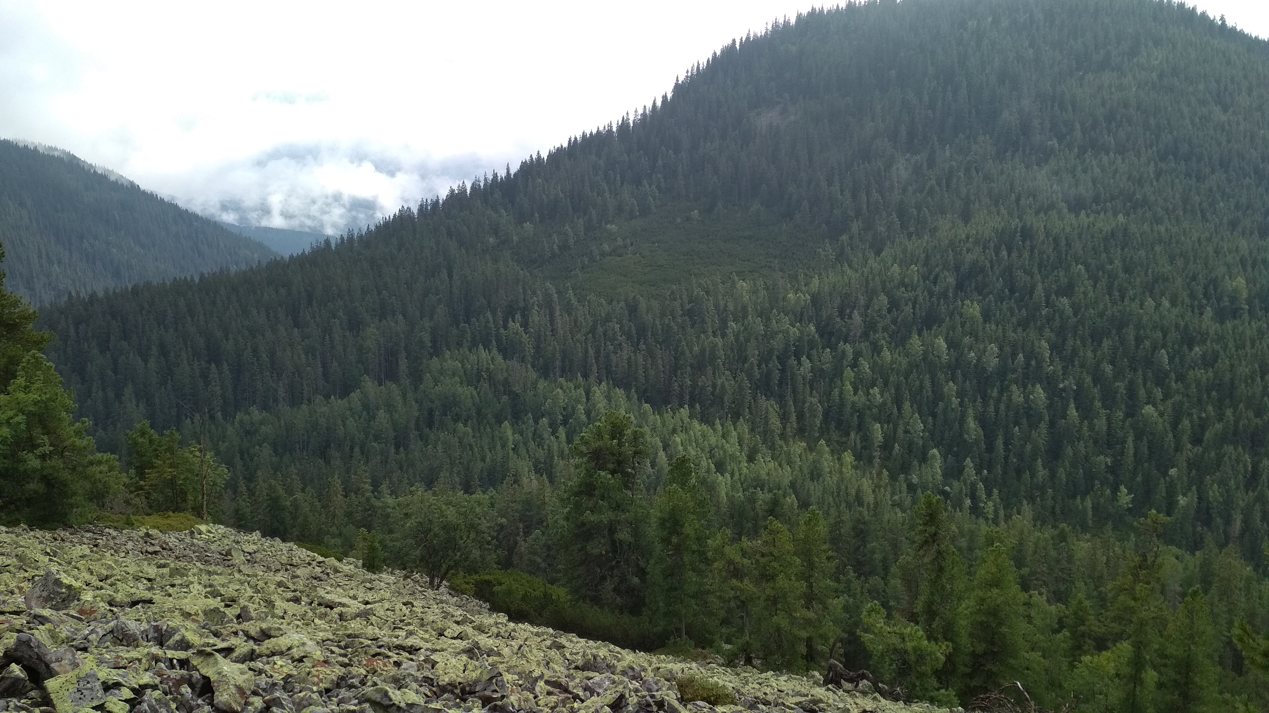 Вид з екологічної стежки